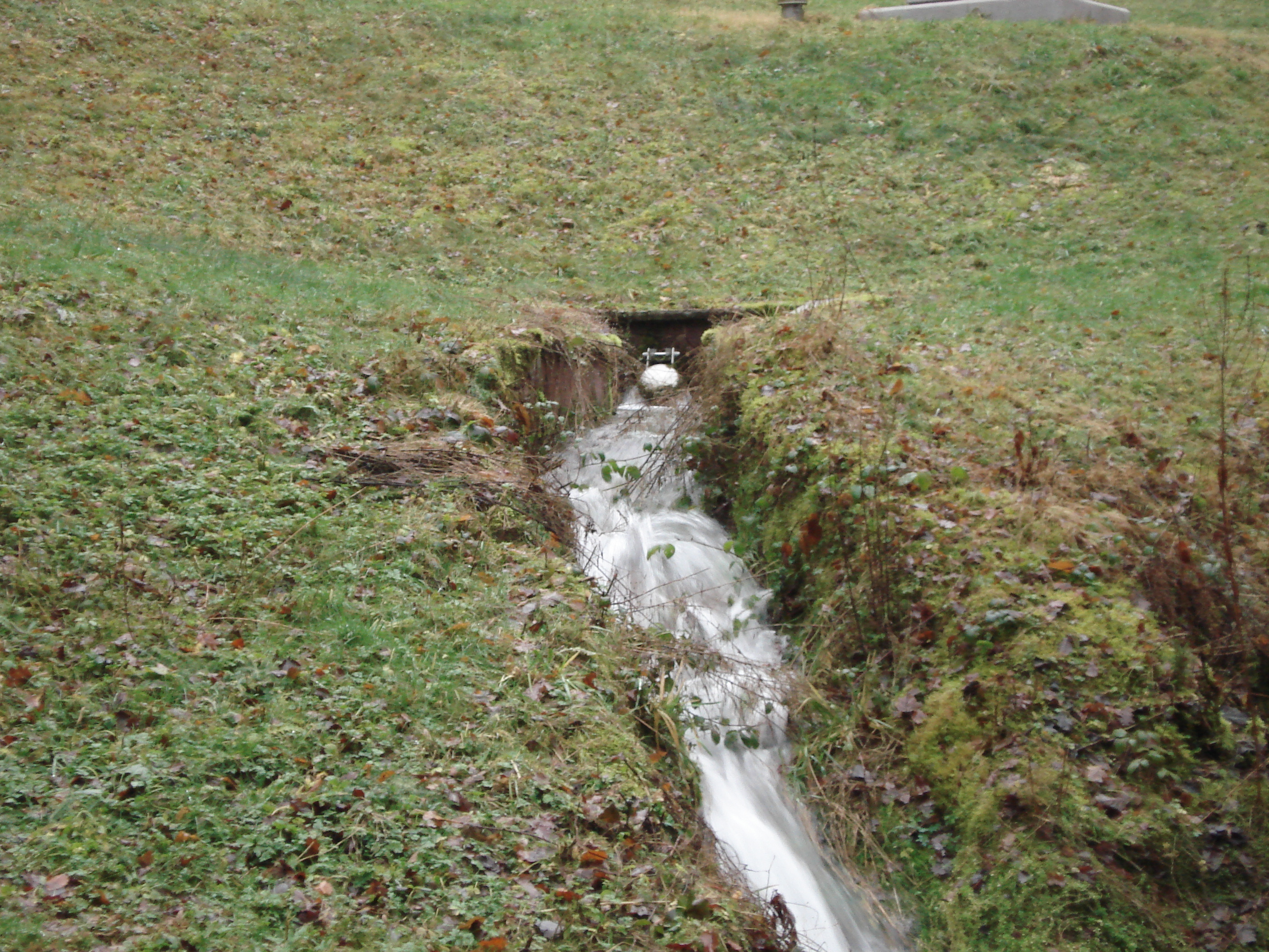 Der Großenbrunnen nördlich von Partenstein ist der Ursprung des Roßbaches